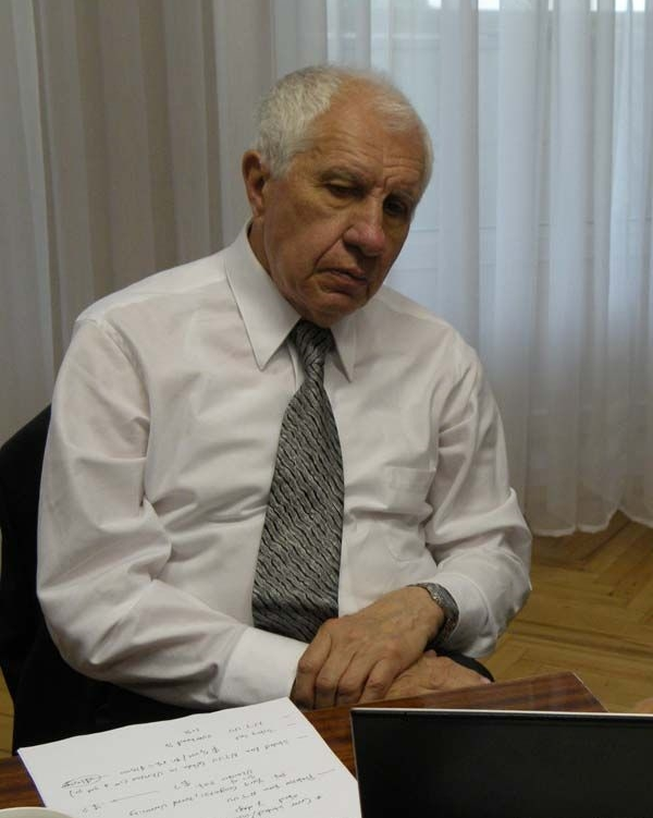 фото професора Гогоці Георгія Антоновича, зроблене мною особисто